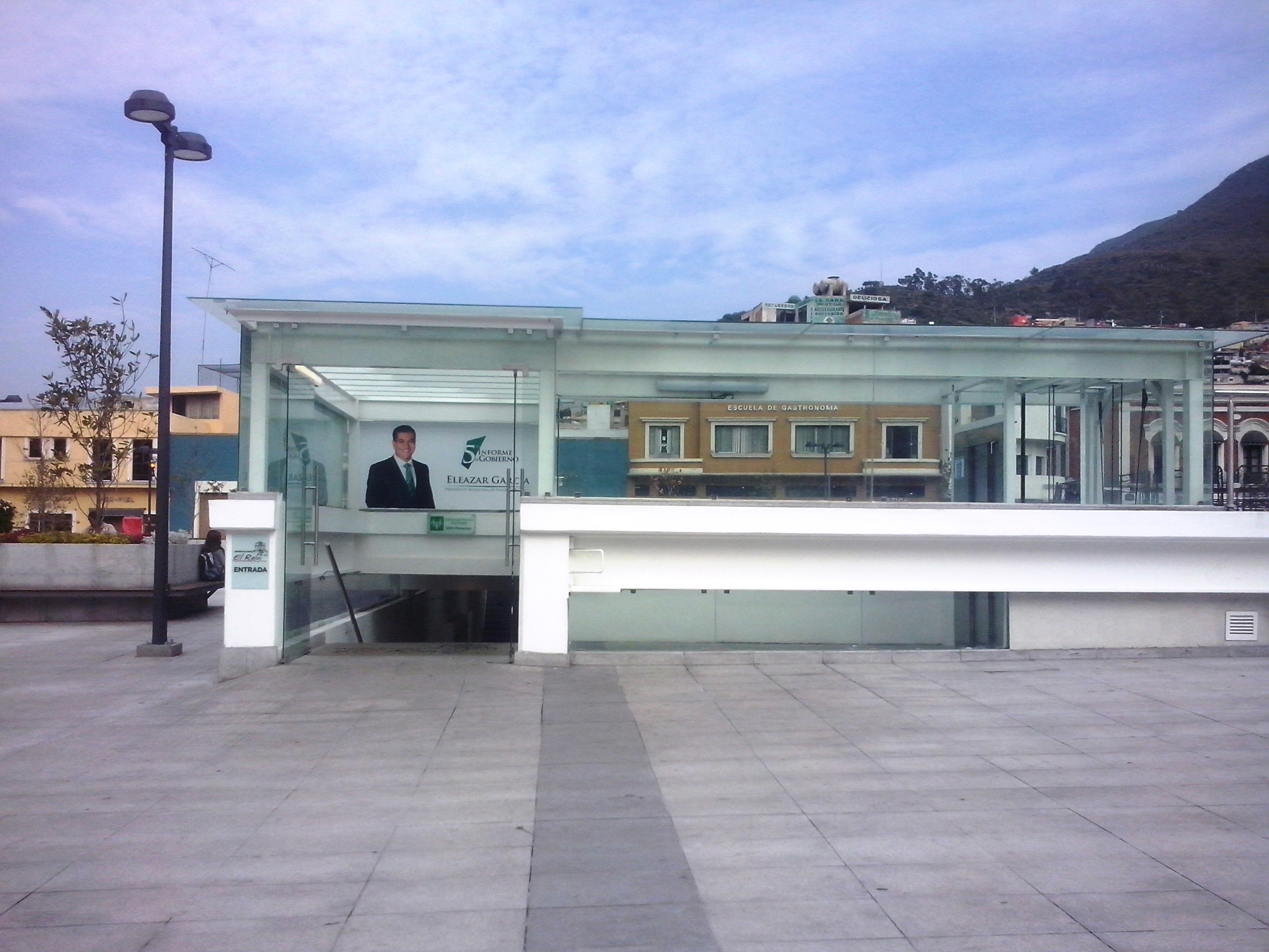 Centro Cultural El Reloj en Pachuca, México